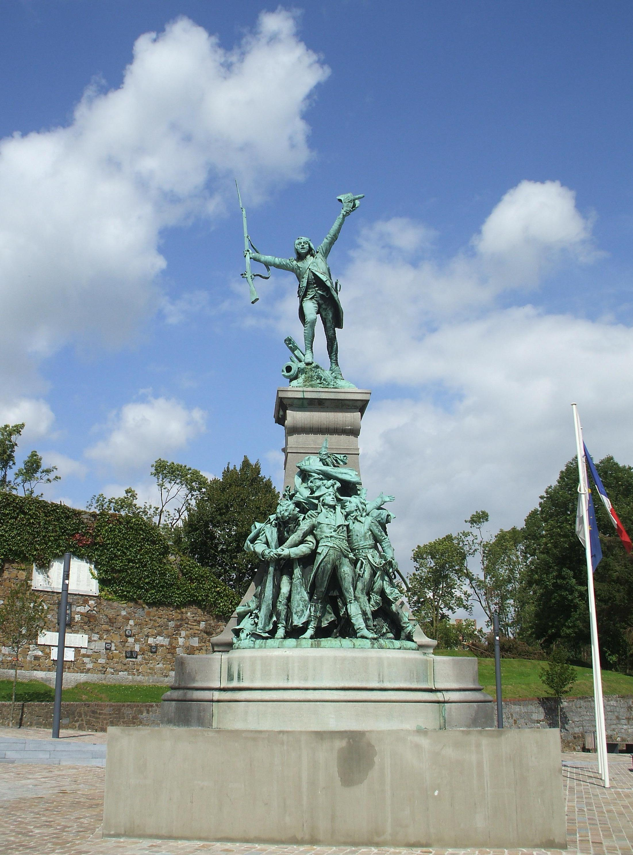 statue des vainqueurs de wattignies qui commémore la victoire des troupes françaises commandées par le général Jourdan sur l’autriche, le 17 octobre 1793